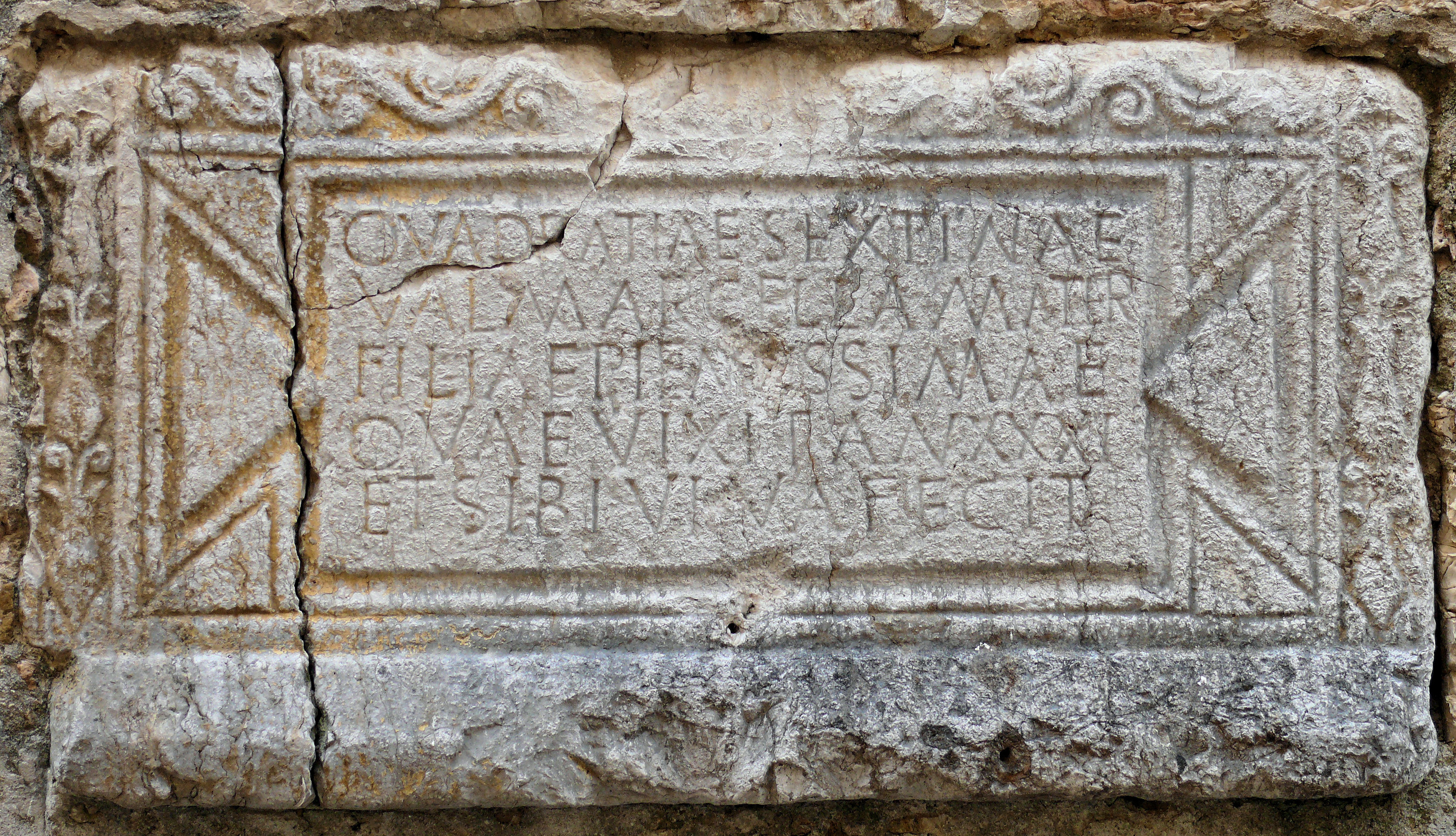 Le Bar-sur-Loup - Église Saint-Jacques-le-Majeur - Plaque funéraire de deux jeunes romaines décédées en l'an II. CIL XII 225 = AE 1988, 871: Quadratiae Sextinae / Val(eria) Marcella mater / filiae pientissimae / quae vixit an(nos) XXXI / et sibi viva fecit .